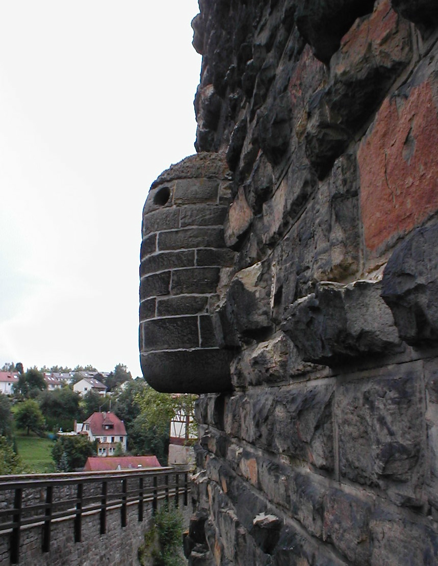 Abort-Erker am Roten Turm, Bad Wimpfen